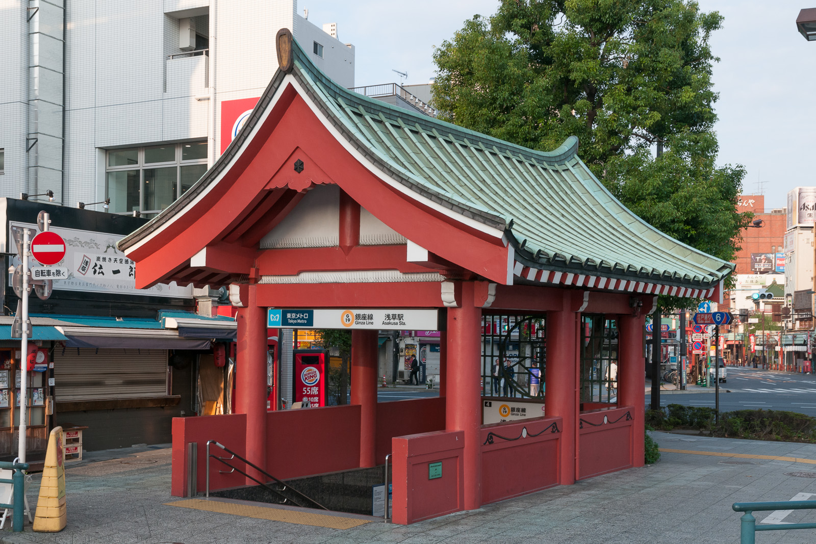 東京メトロ銀座線浅草駅、東京都台東区浅草。